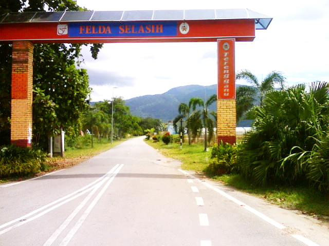 simpang yang menuju ke Perkampungan Felda Selasih.